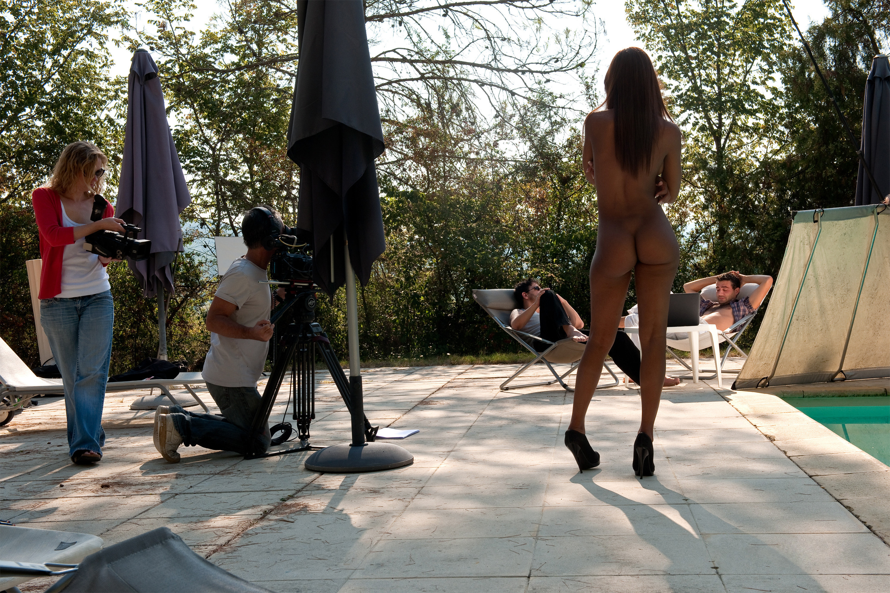 Tournage du film "Mangez-moi !", de John B. Root. Assis, au second plan : Titof et Phil Hollyday. De dos : Katya dé Lys.